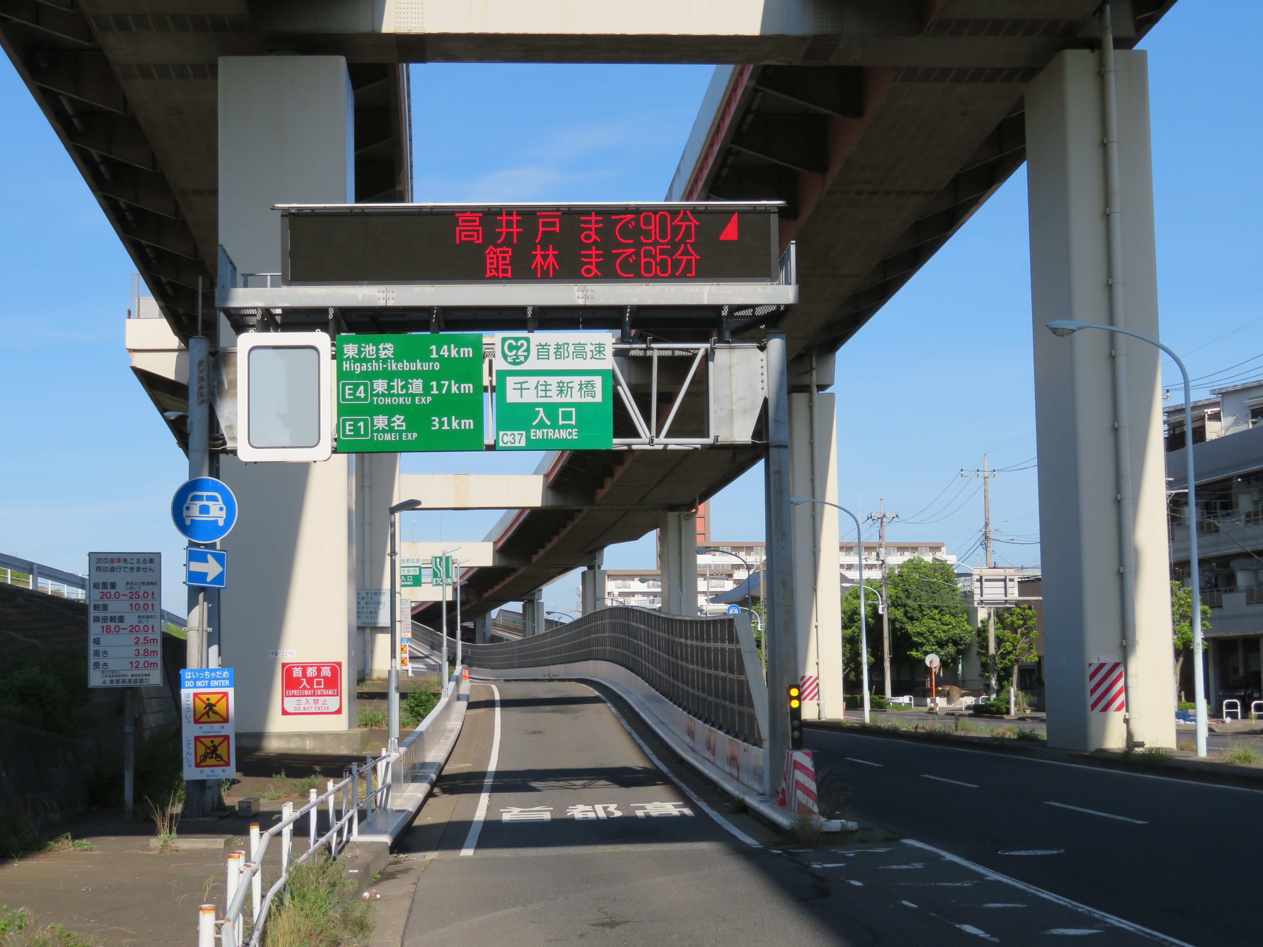 首都高速中央環状線千住新橋入口（江北ＪＣＴ方面側入口を撮影） Canon PowerShot SX720 HS